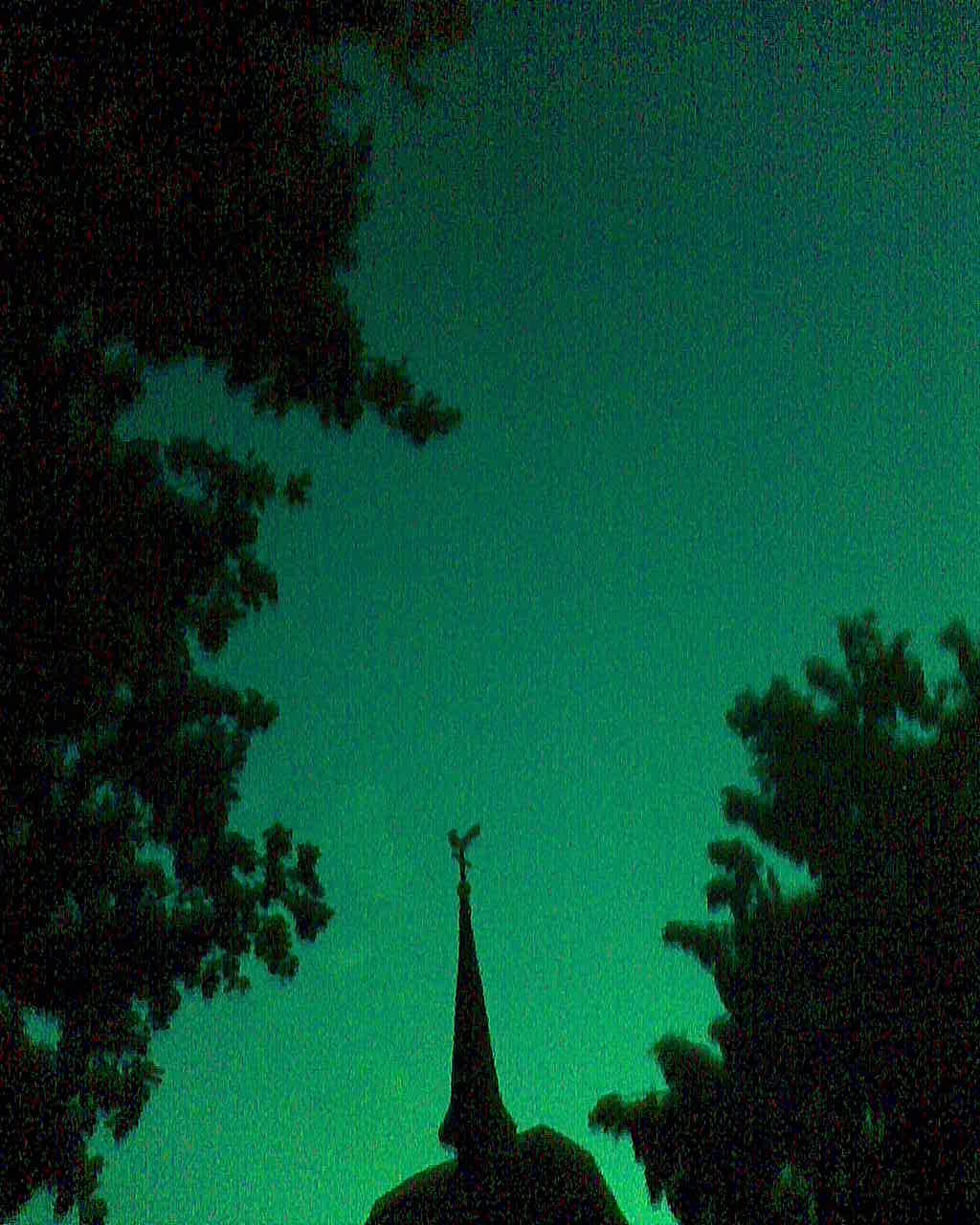 Fagersta Kyrka